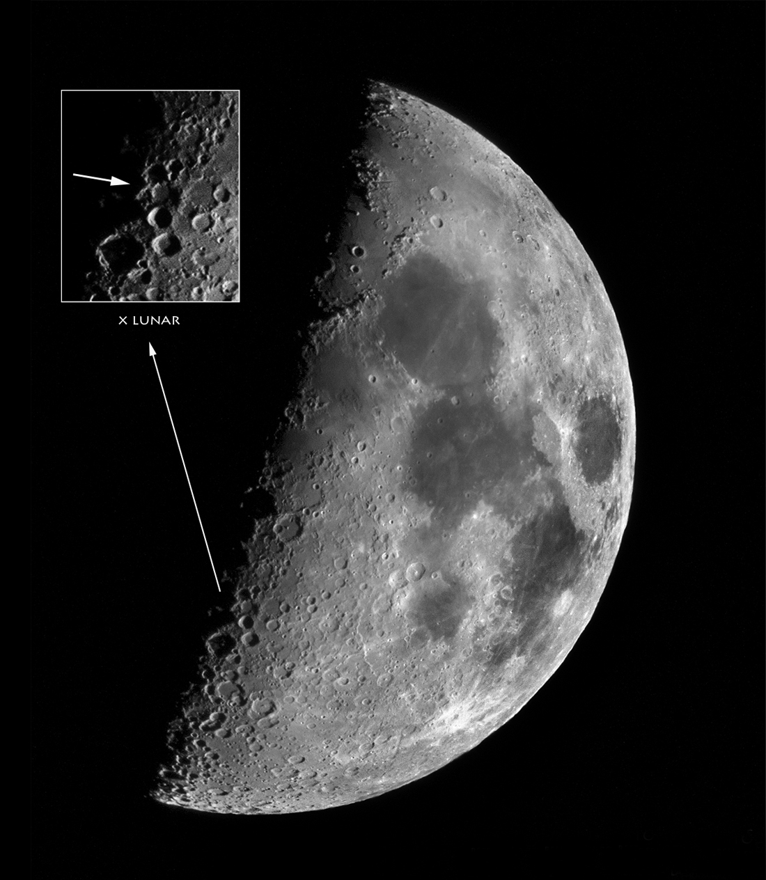 X lunar